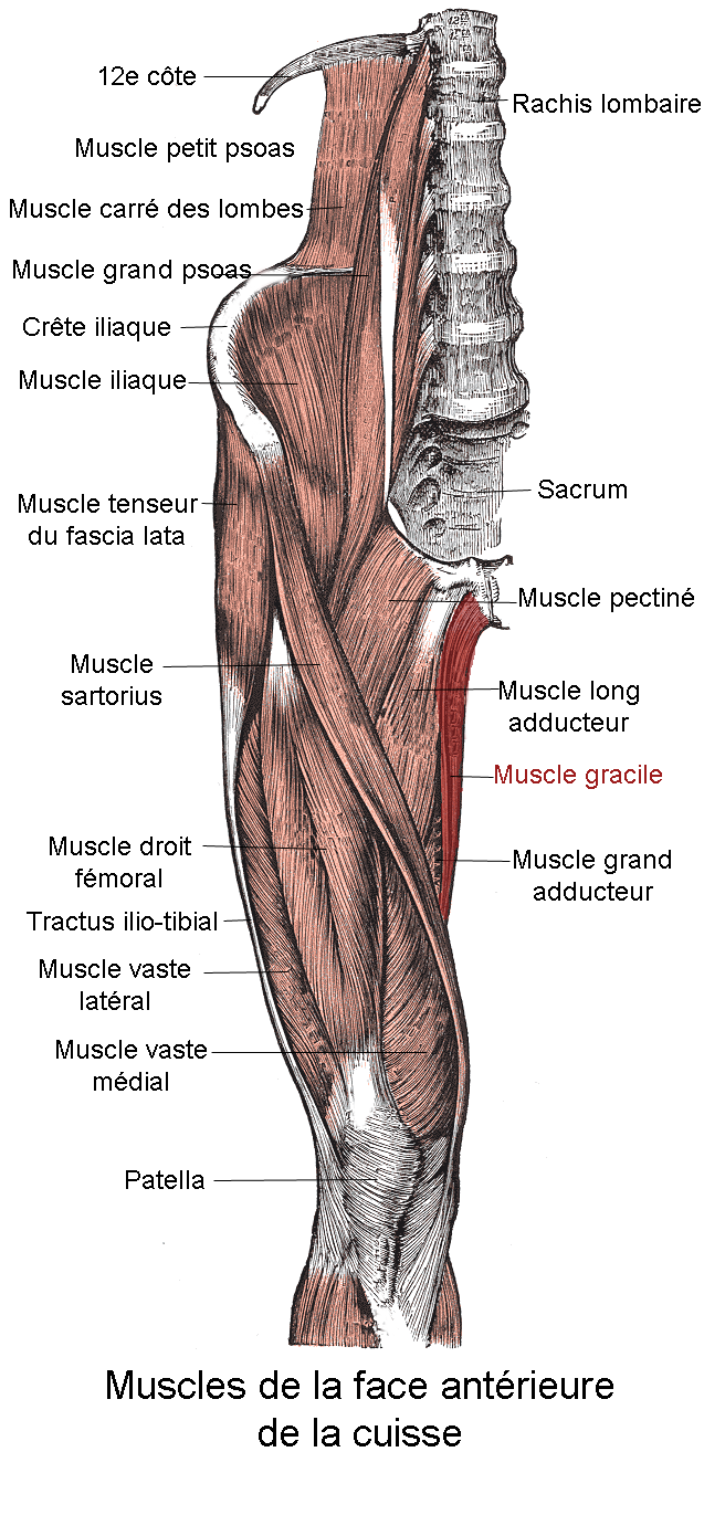 Muscle gracile. Anatomie humaine.